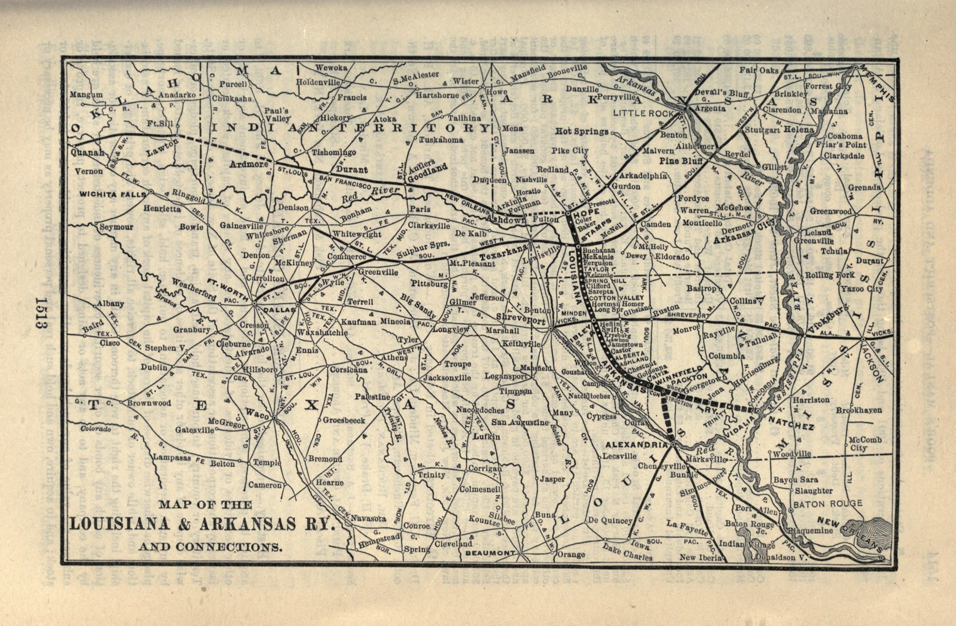 Louisiana and Arkansas Railway